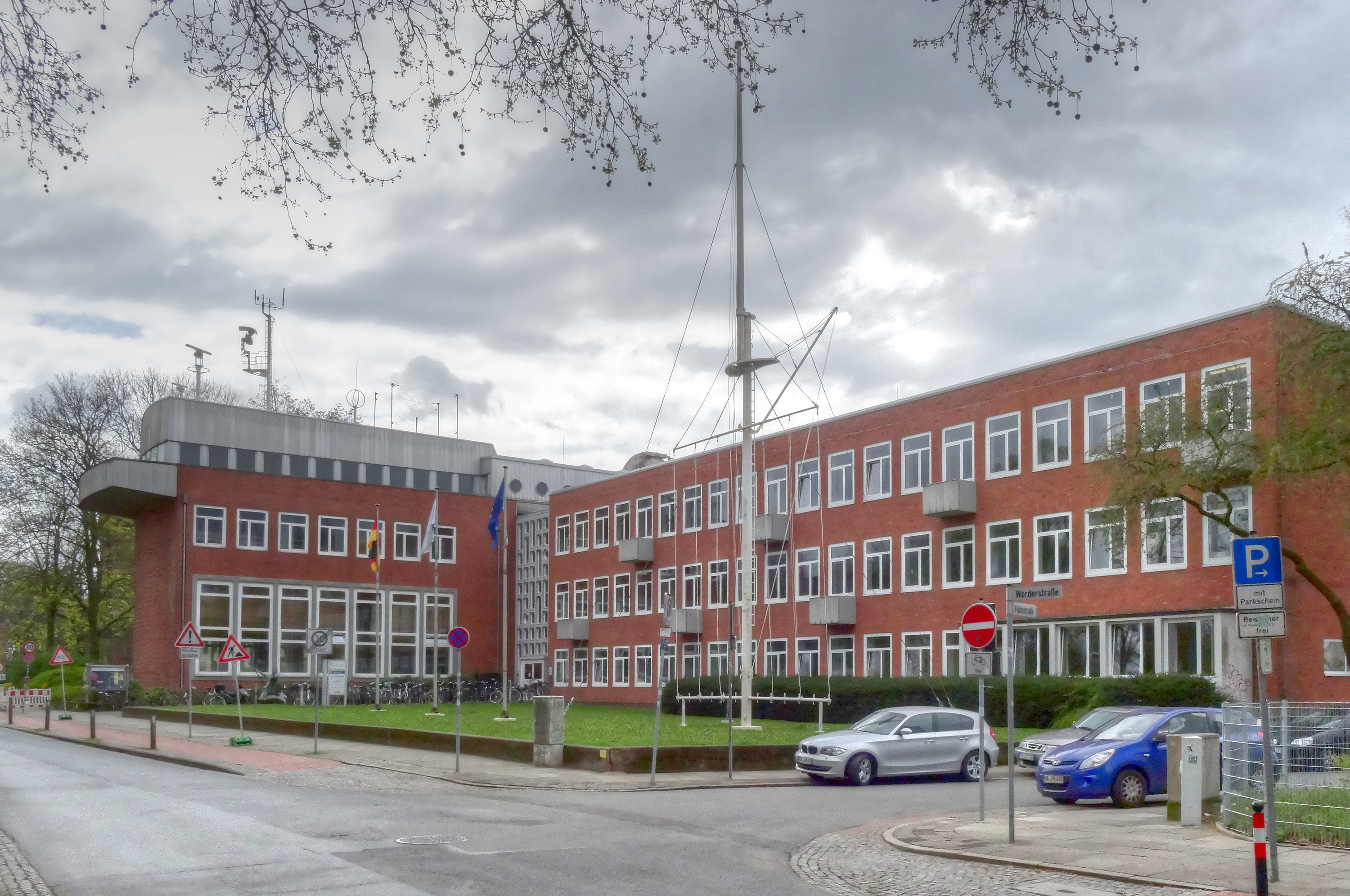 Seefahrtschule, Hochschule für Nautik in Bremen, Werderstraße 73Die Gesamtanlage ist ein geschütztes Kulturdenkmal in der Freien Hansestadt Bremen, mit der Nr. 1220,T beim Landesamt für Denkmalpflege registriert.